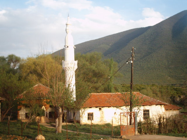 Semenište mosque